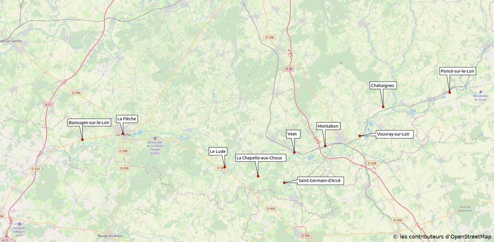 Cette carte montre les différentes villes traversées par le GR 35. L'itinéraire en lui-même est soumis au droit d'auteur et ne peut donc être apposé sur un fond OSM. Un juriste de la FFRandonnée a validé que l'utilisation de cette image sur Wikipédia est possible.